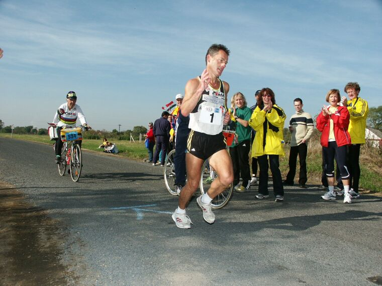 Bogár János a 2004-es Bécs–Pozsony–Budapest Szupermaratonon